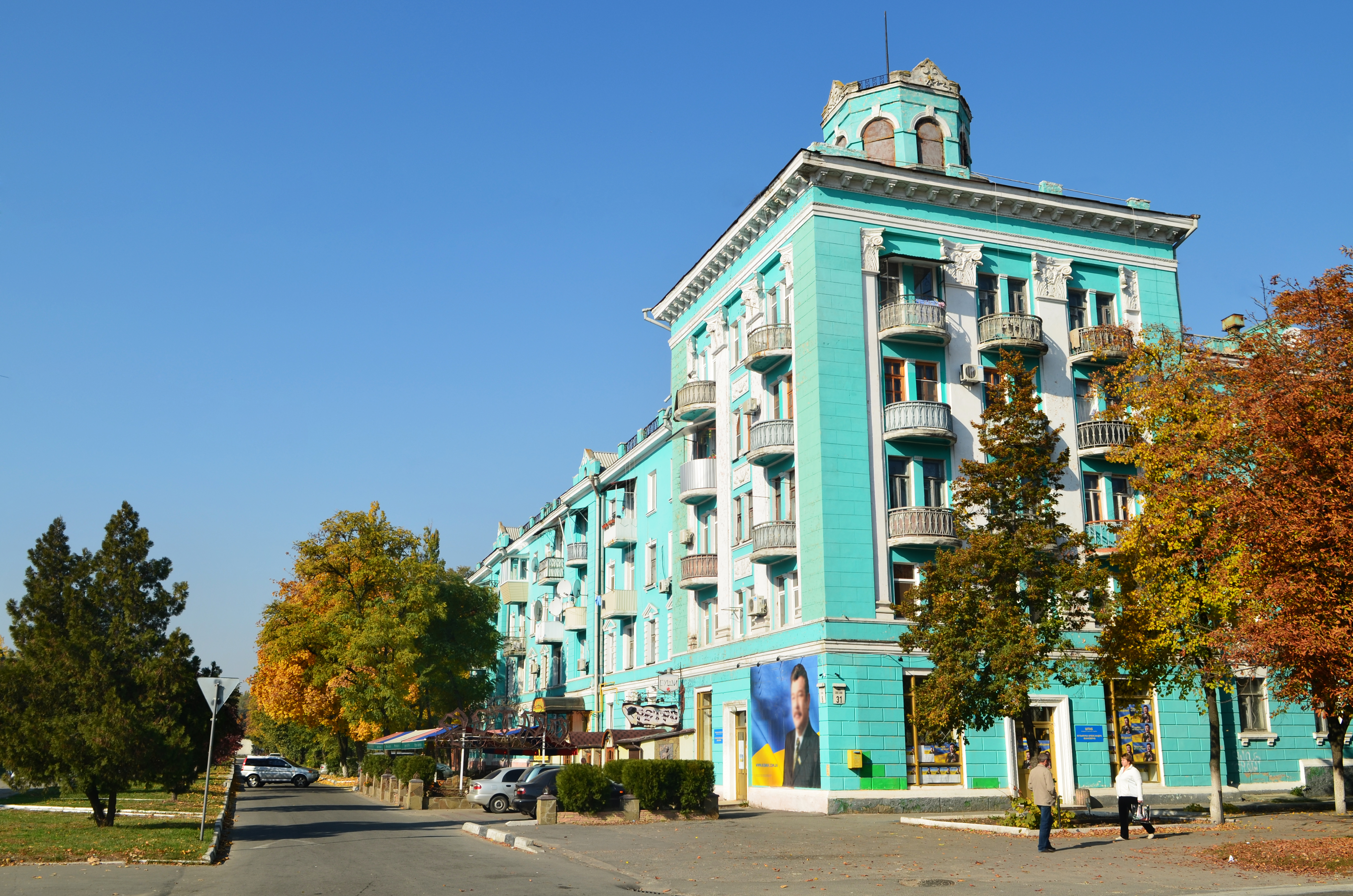 Житловий будинок, Новомосковськ, вул. Радянська, 31